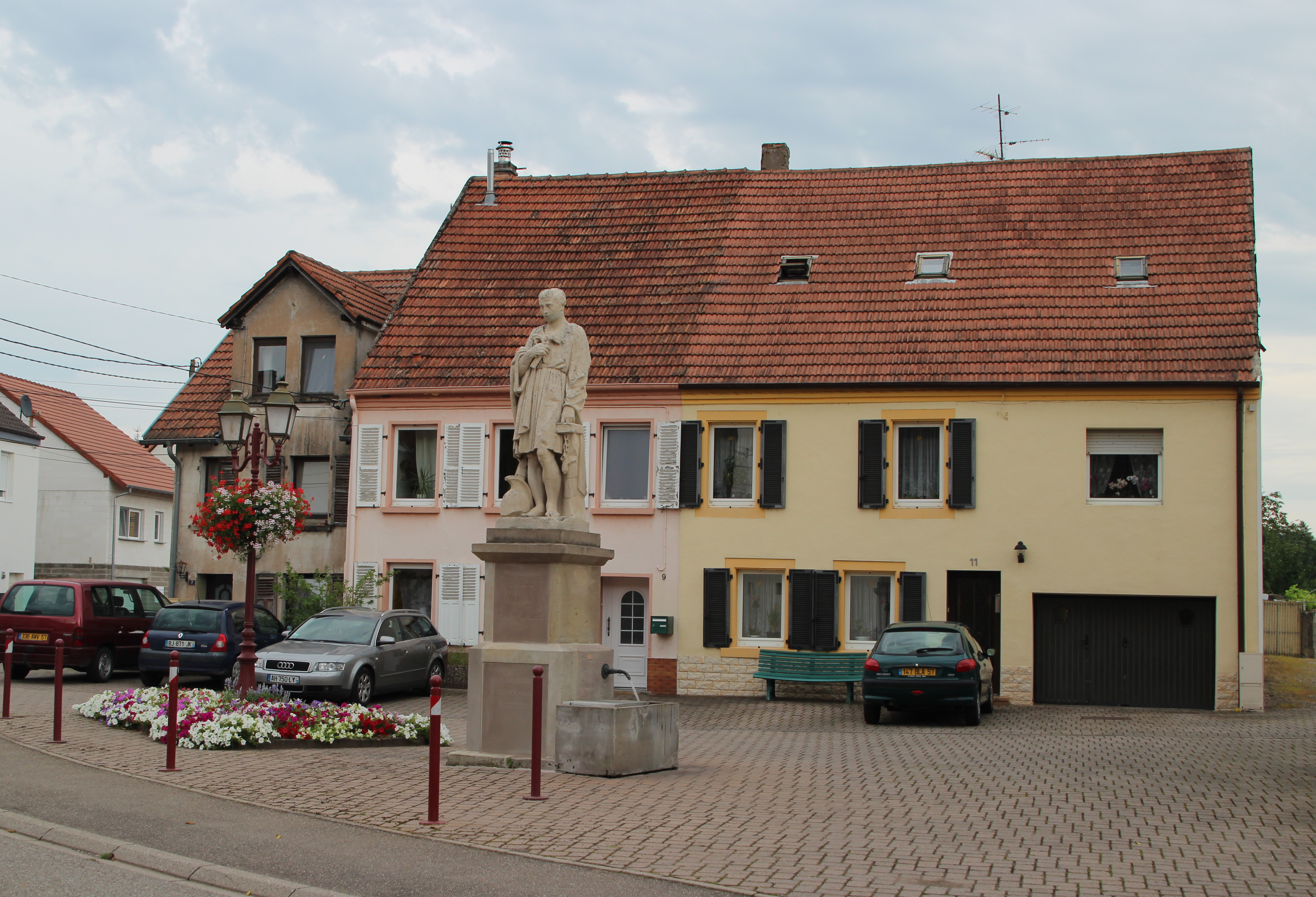 Bildinhalt: Statue des Heiligen Quirin mit Brunnen, Rue Principale Aufnahmeort: Blies-Guersviller, Frankreich